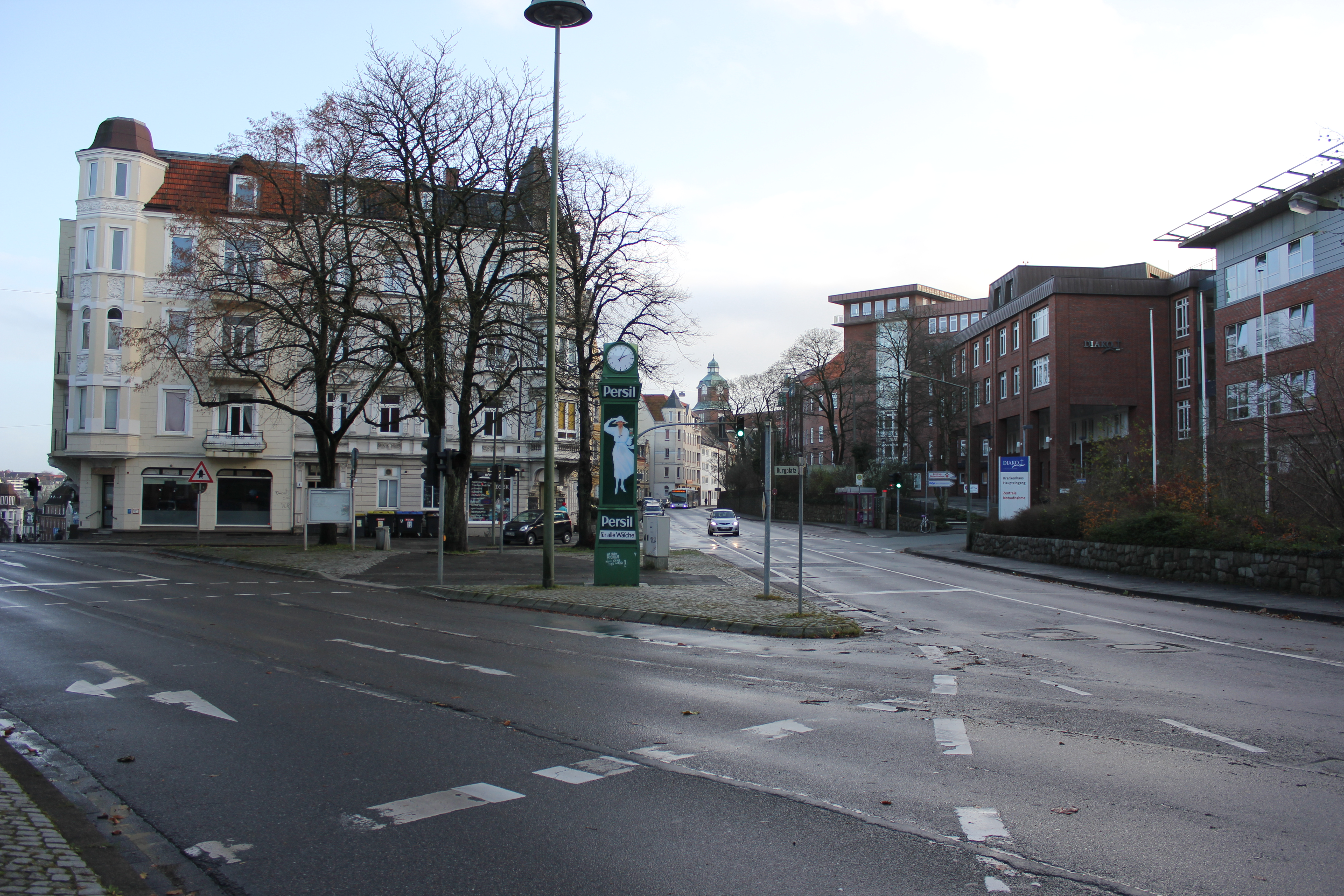 Burgplatz mit Blick auf die DIAKO (Flensburg)